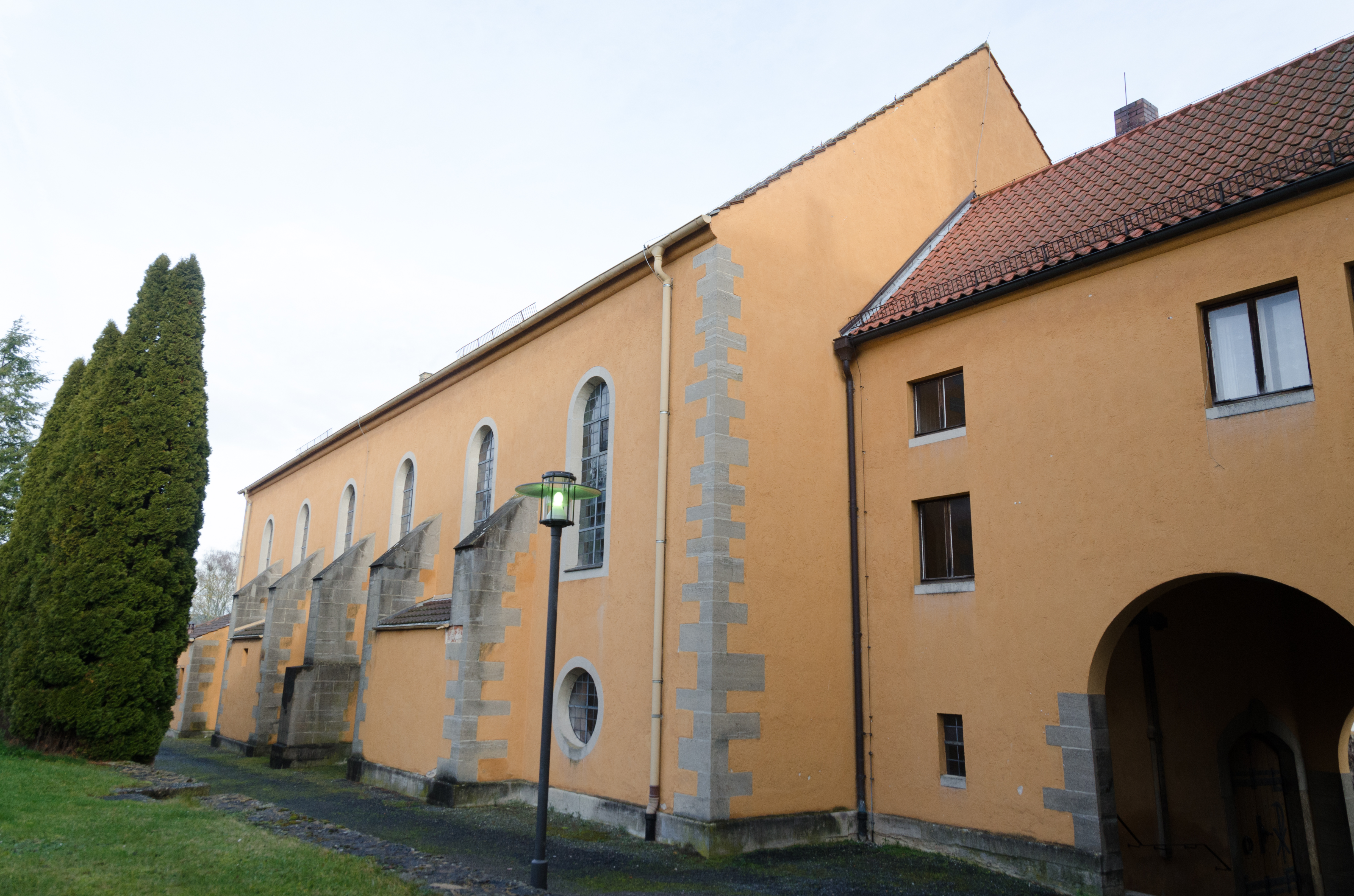 Unsleben, Kirchplatz, neue Kirche, 004